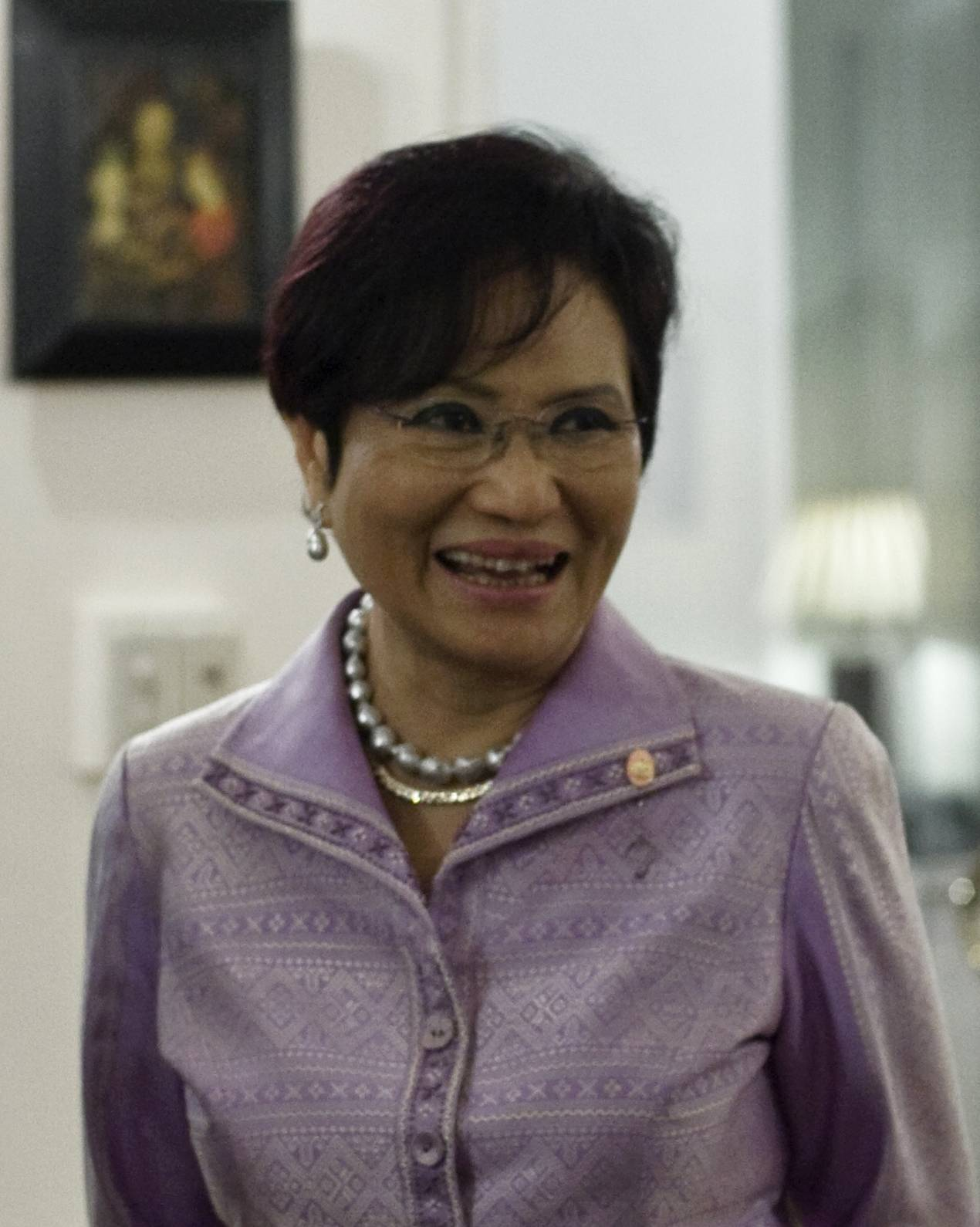 กัลยา โสภณพนิช / นายกรัฐมนตรีร่วมงานถวายเลี้ยงพระกระยาหารค่ำแด่สมเด็จพระเทพรัตนราชสุดาฯ สยามบรมราชกุมารี ในโอกาสที่ผู้บริหาร British Council เยือนประเทศไทย 12 มกราคม2553 (The Official Site of The Prime Minister of Thailand Photo by พีรพัฒน์ วิมลรังครัตน์)